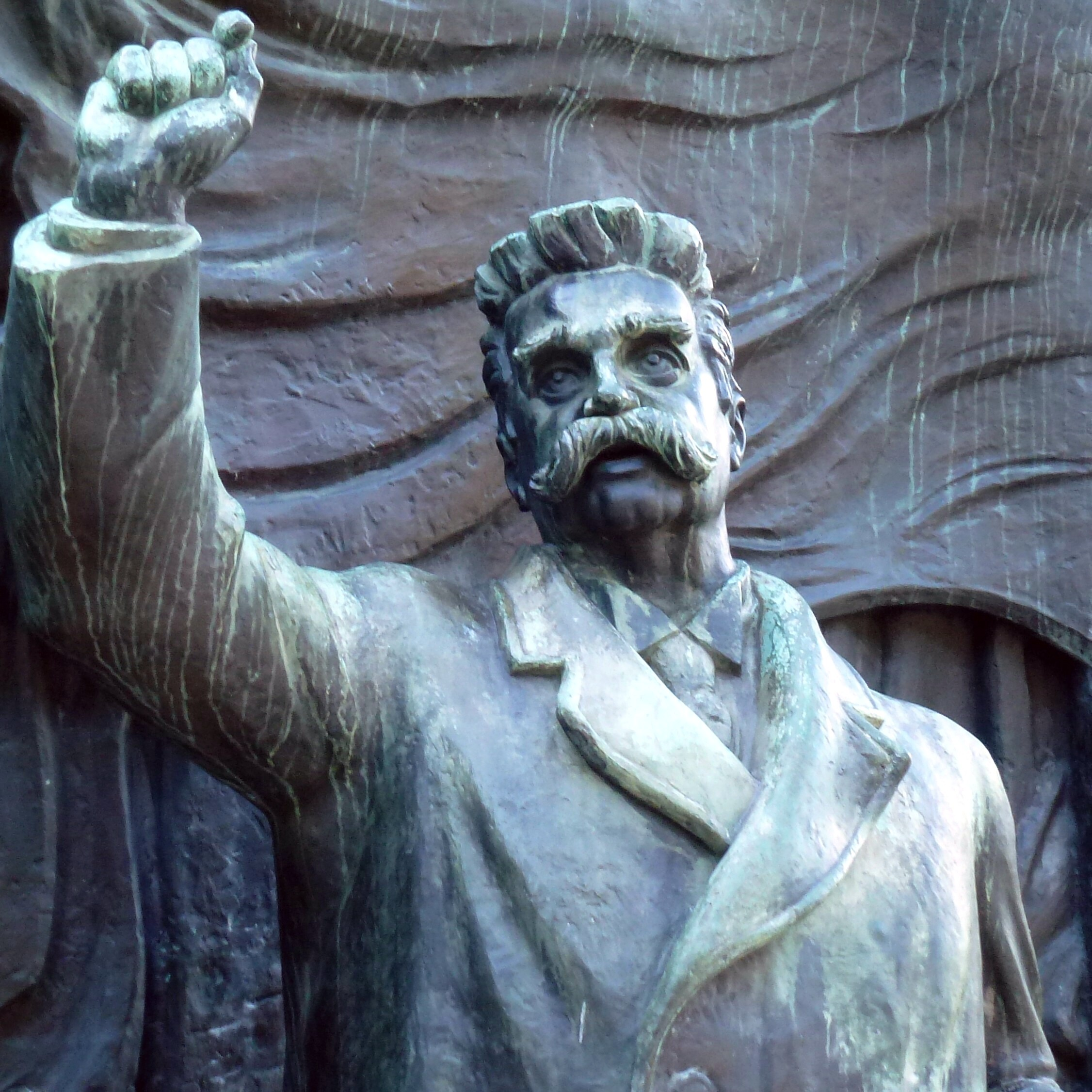 Brantingmonumentet norra sidan detalj (Branting)